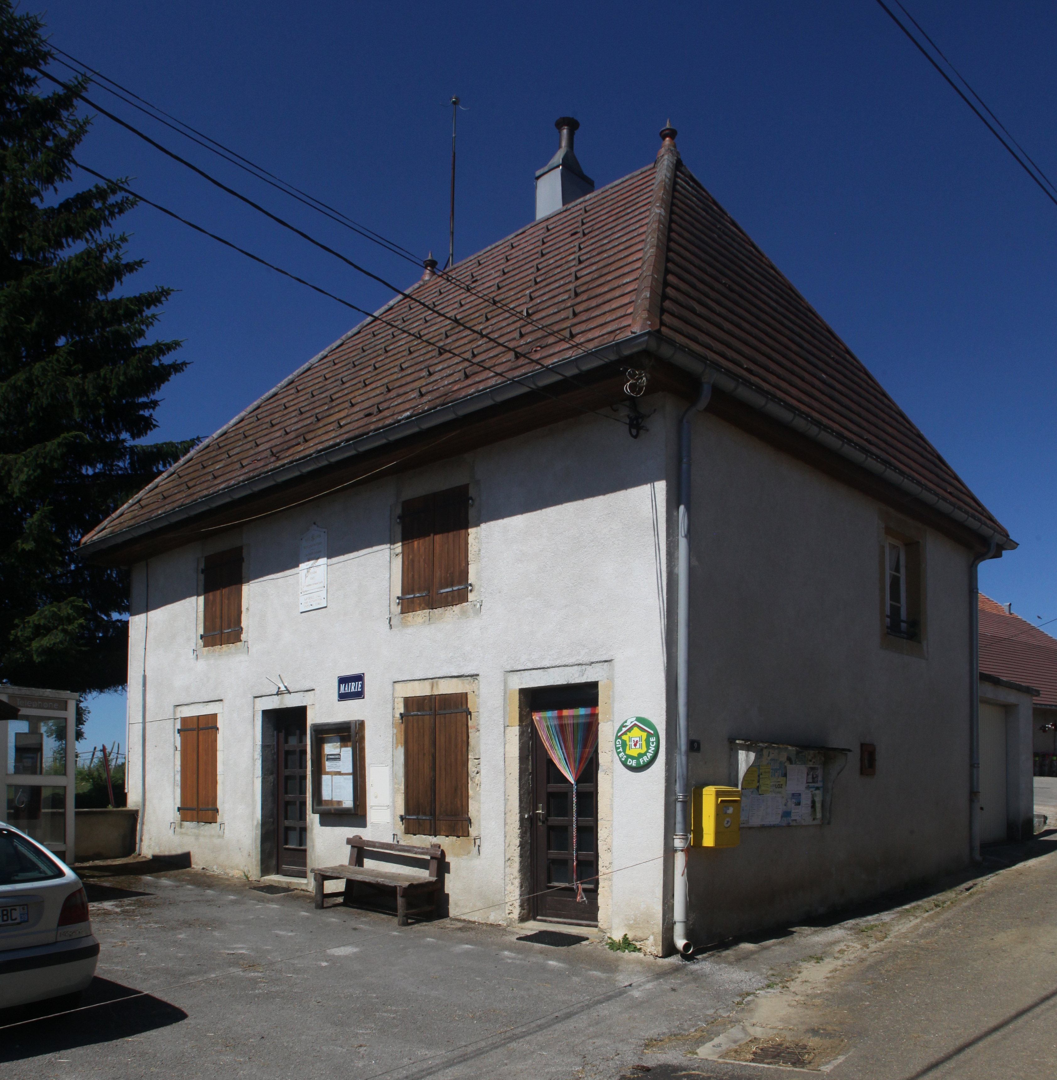 Mairie de Plénisette (Jura).